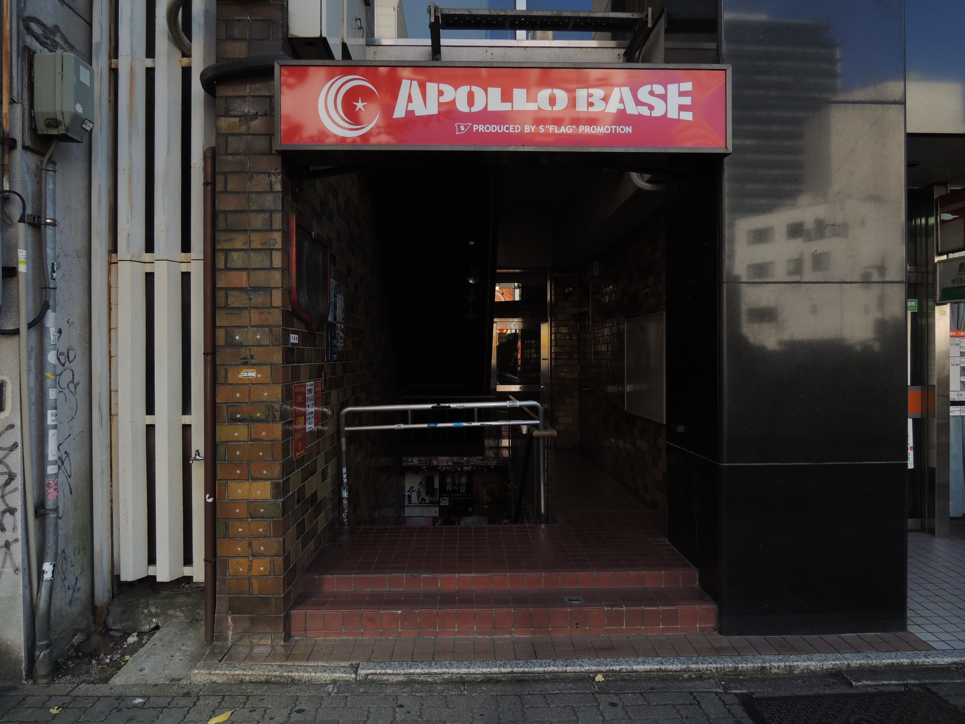 ＡＰＯＬＬＯ ＢＡＳＥ入口（雲竜フレックスビル 東館地下）